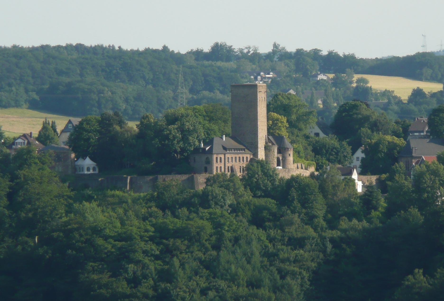 Burg Blankenstein mit Kirche